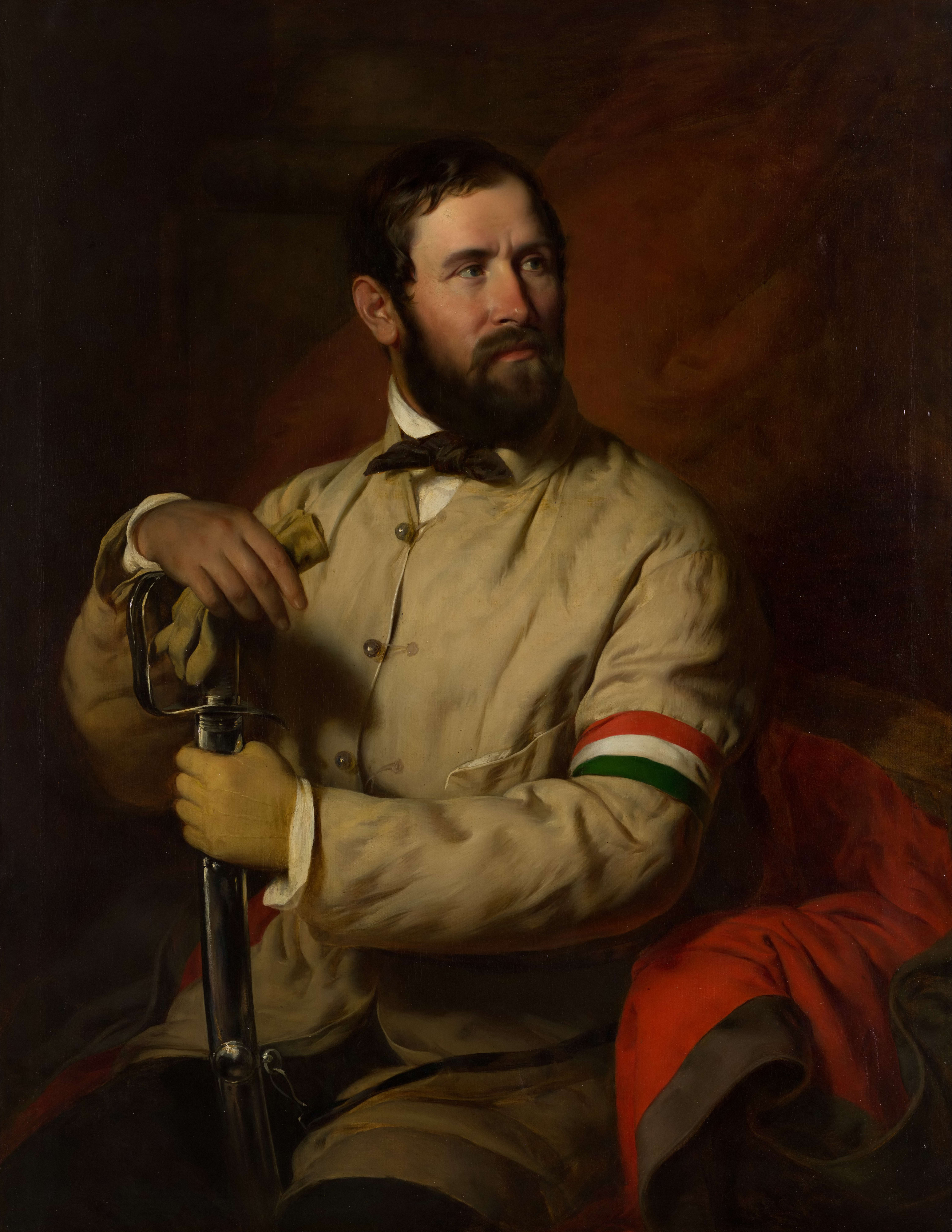 Borsos József: Nemzetőr. Korábban tévesen hol Zitterbarth Mátyás építész, hol Rottenbiller Lipót pesti polgármester képmásának tartották.